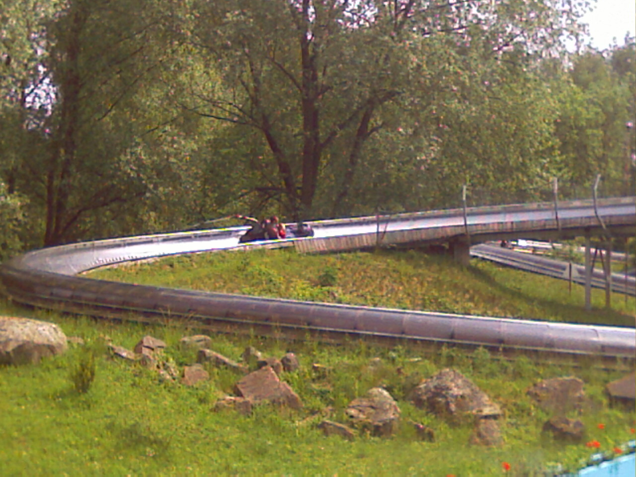 Rastiland Bobbahn